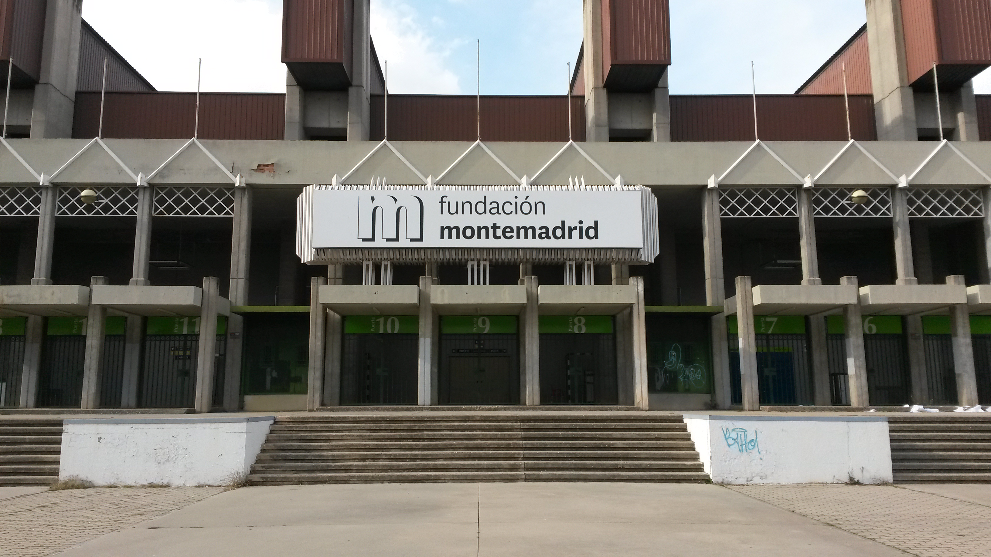 puerta principal pabellón montemadrid